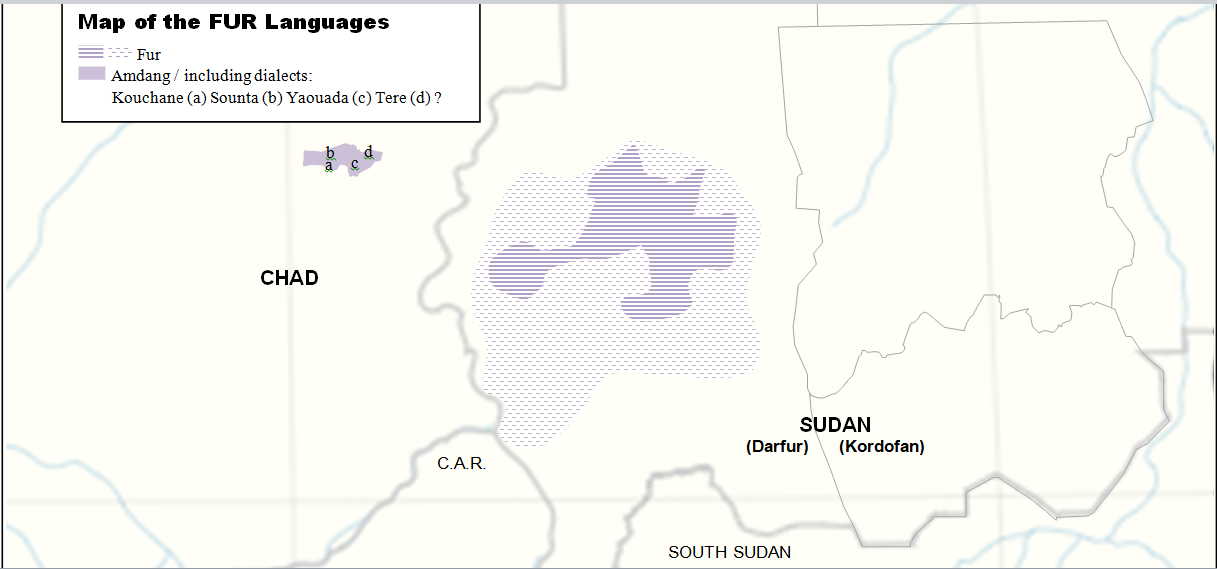 Map of the Fur Languages